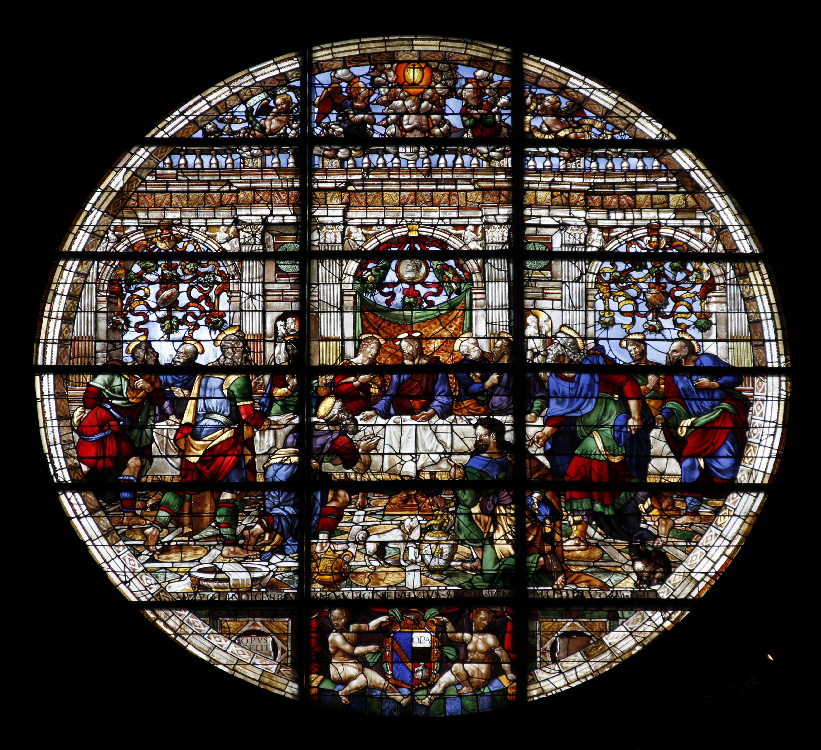 Duomo - Siena